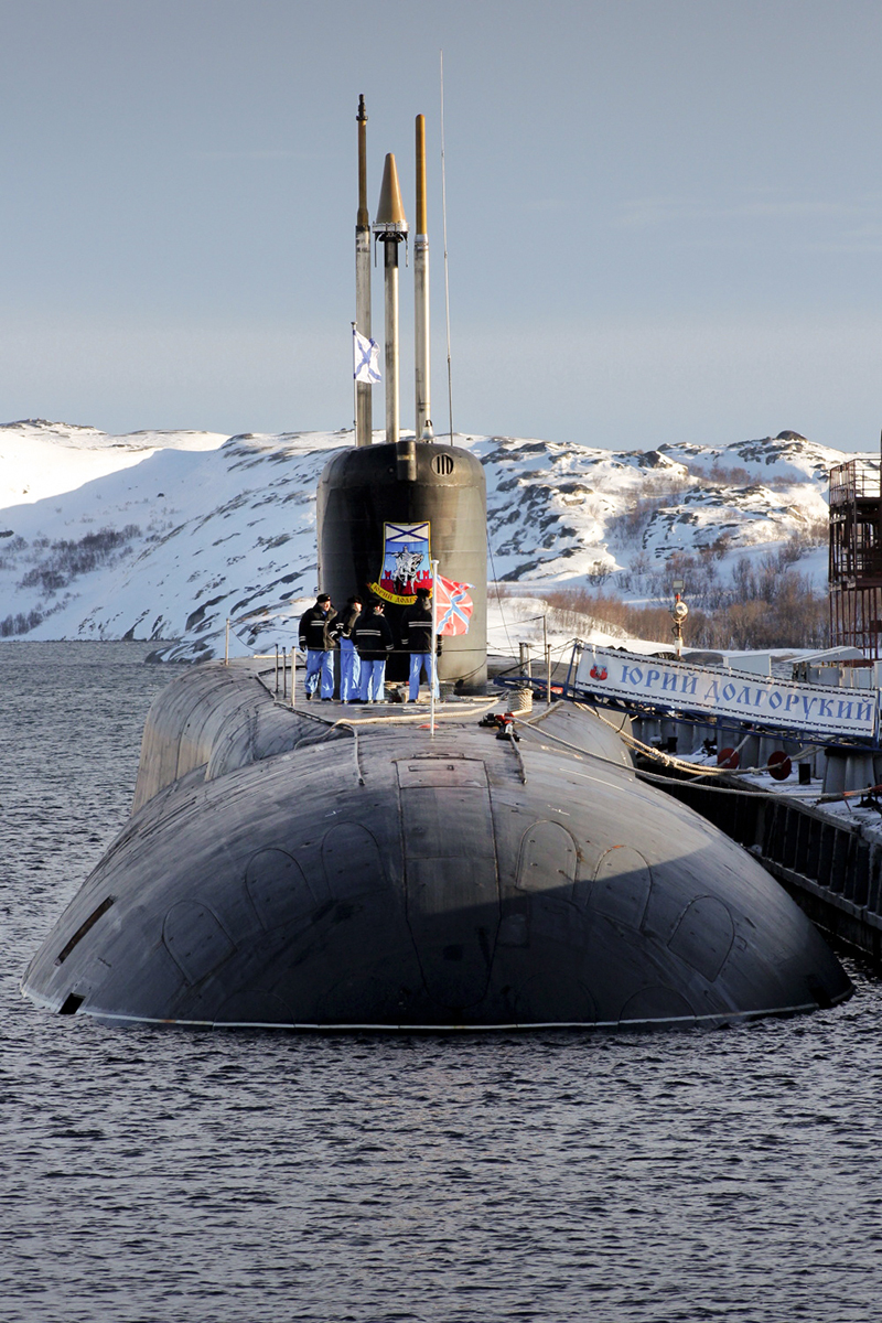 Базовая подготовка первого экипажа головного корабля проекта 955 «Борей» ракетного подводного крейсера стратегического назначения Северного флота «Юрий Долгорукий» (Мурманская область)